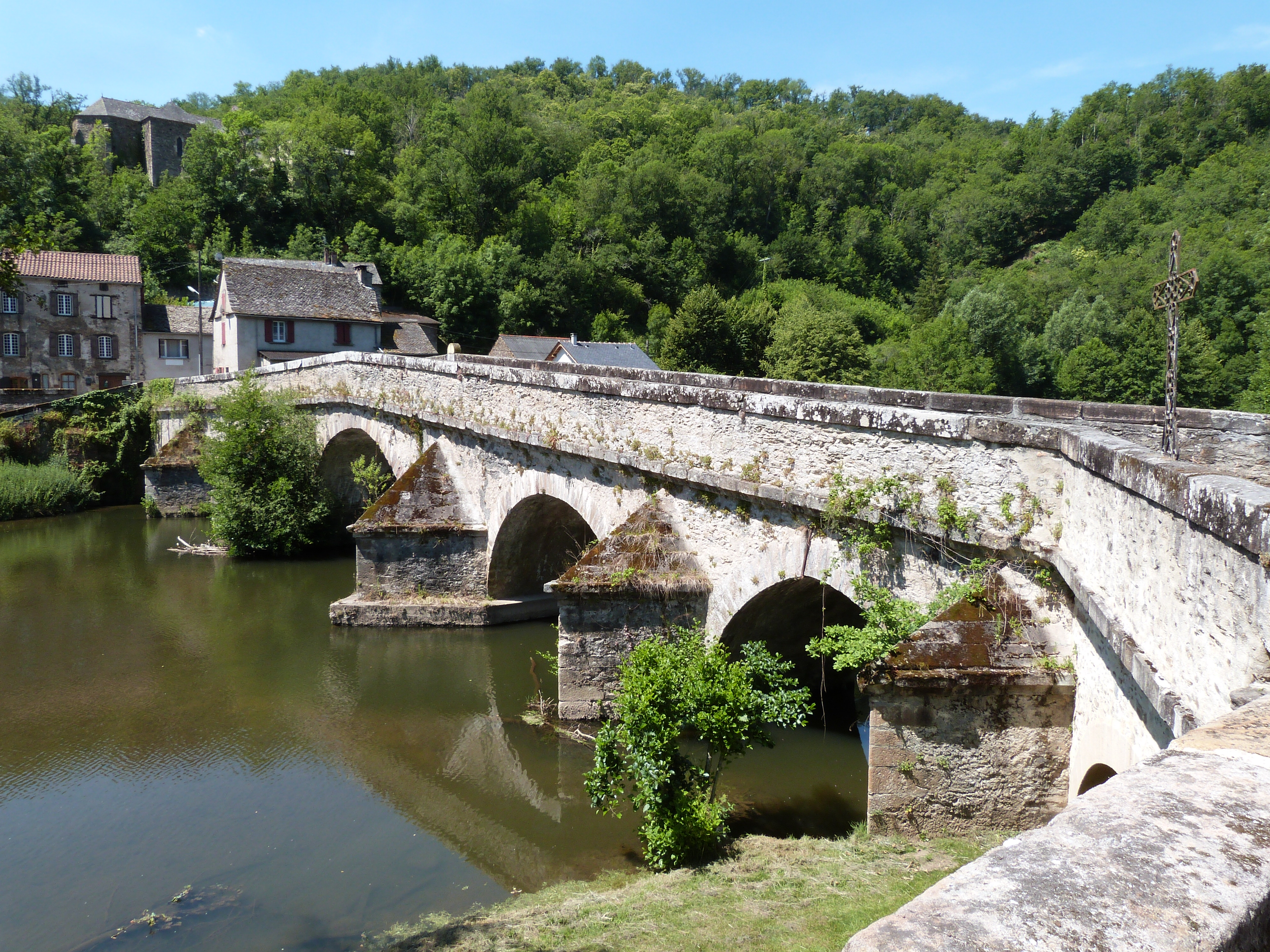 Le pont de Cirou et ses six arches en plein cintre qui enjambe le Viaur